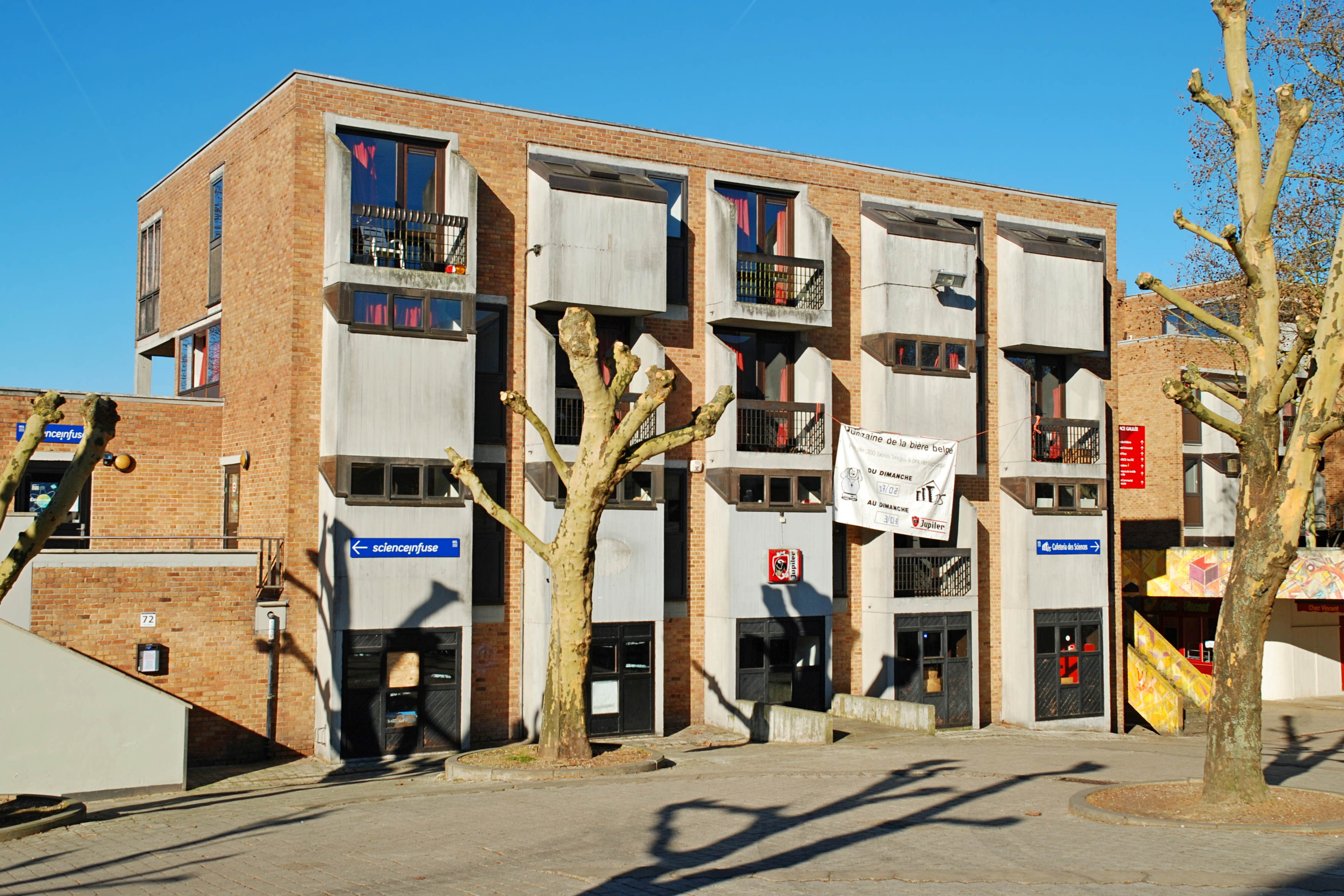 Belgique - Brabant wallon - Louvain-la-Neuve - Place Galilée (architecture brutaliste)